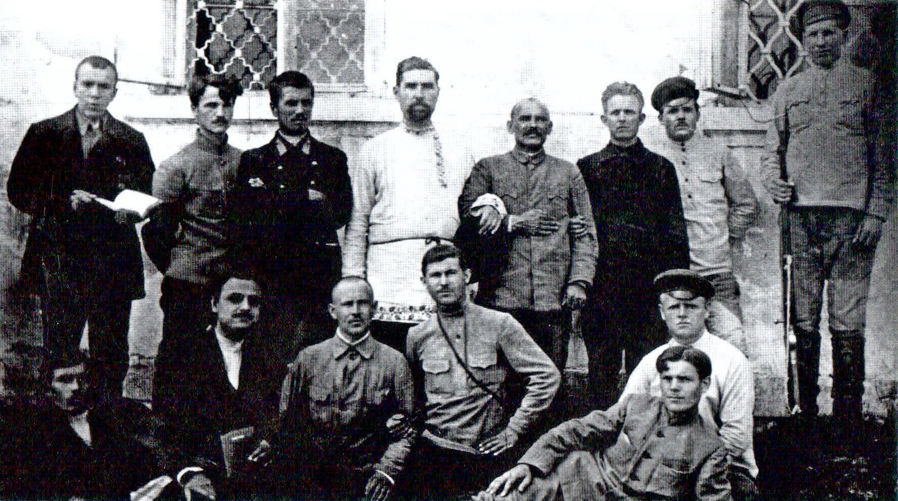 И. С. Проханов в день освобождения из тюрьмы